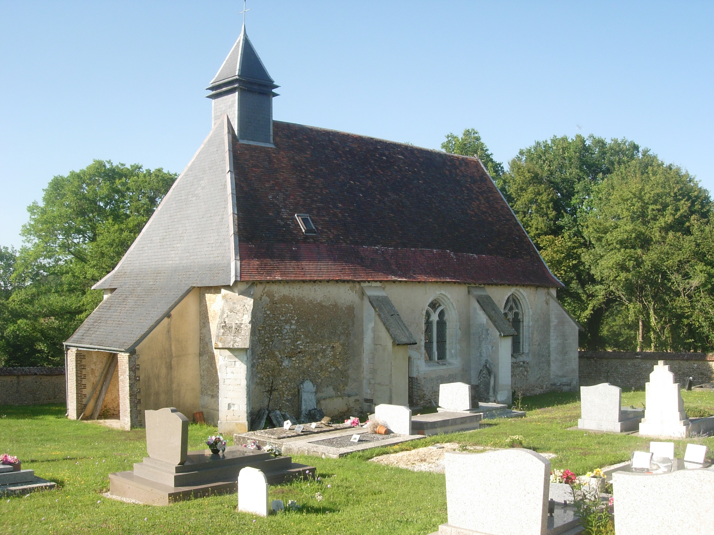 Chapelle de Nogent-en-Othe (Aube)